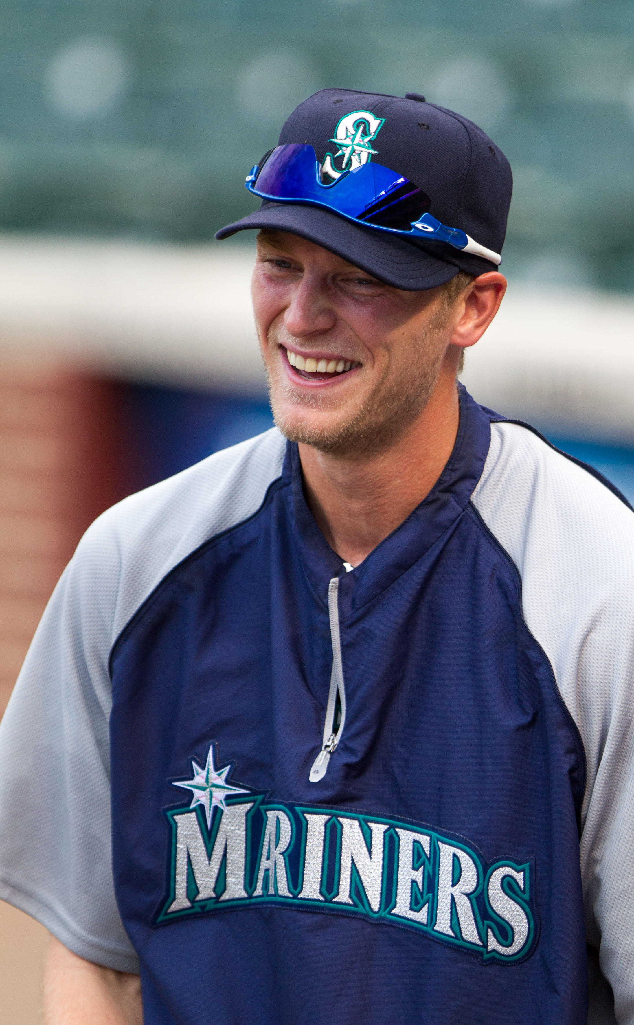 Seattle Mariners center fielder Michael Saunders – Mariners at Orioles August 6, 2012